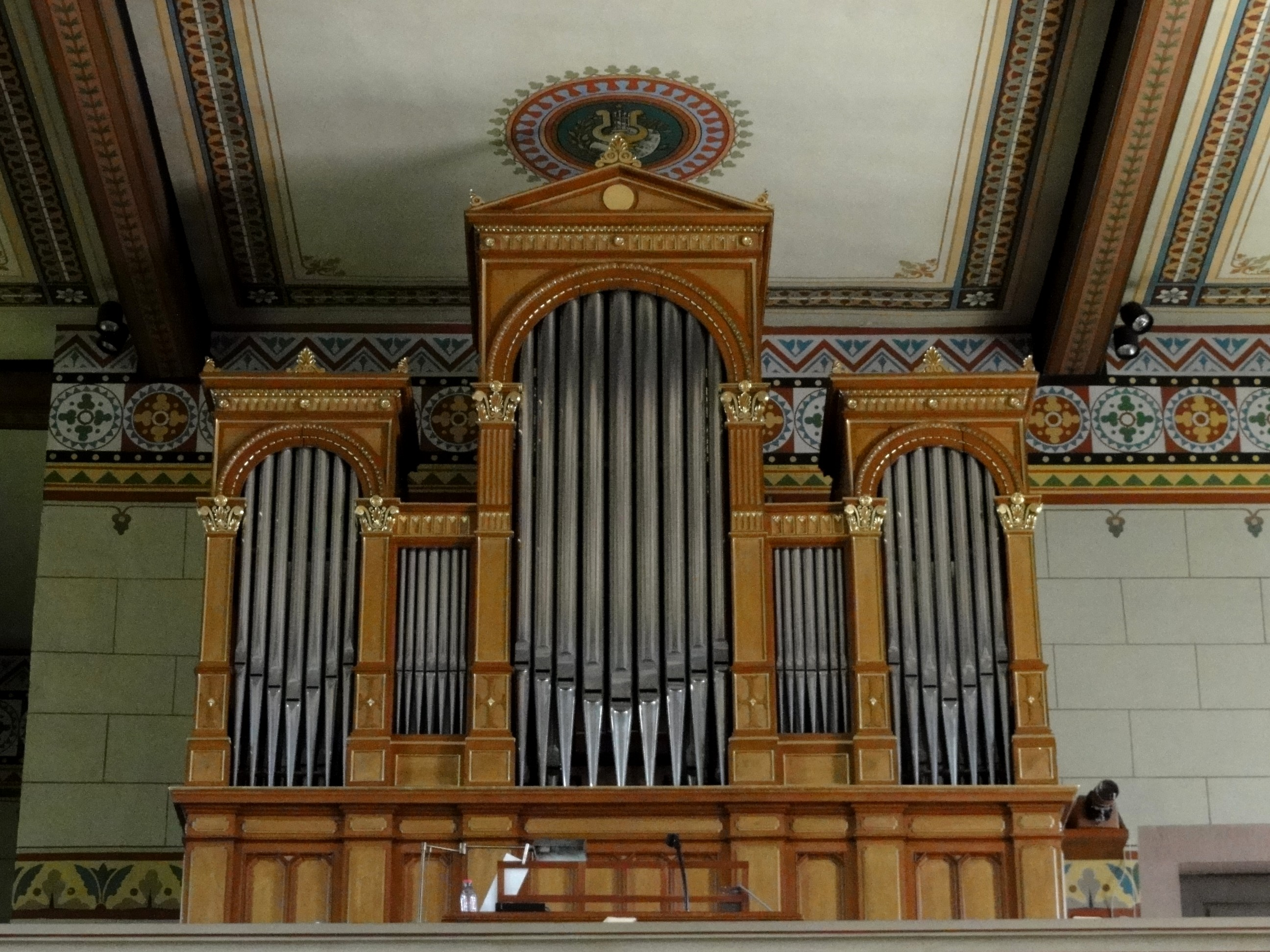 Baden-Württemberg, Bollschweil, Pfarrkirche St. Hilarius, Weber Orgel